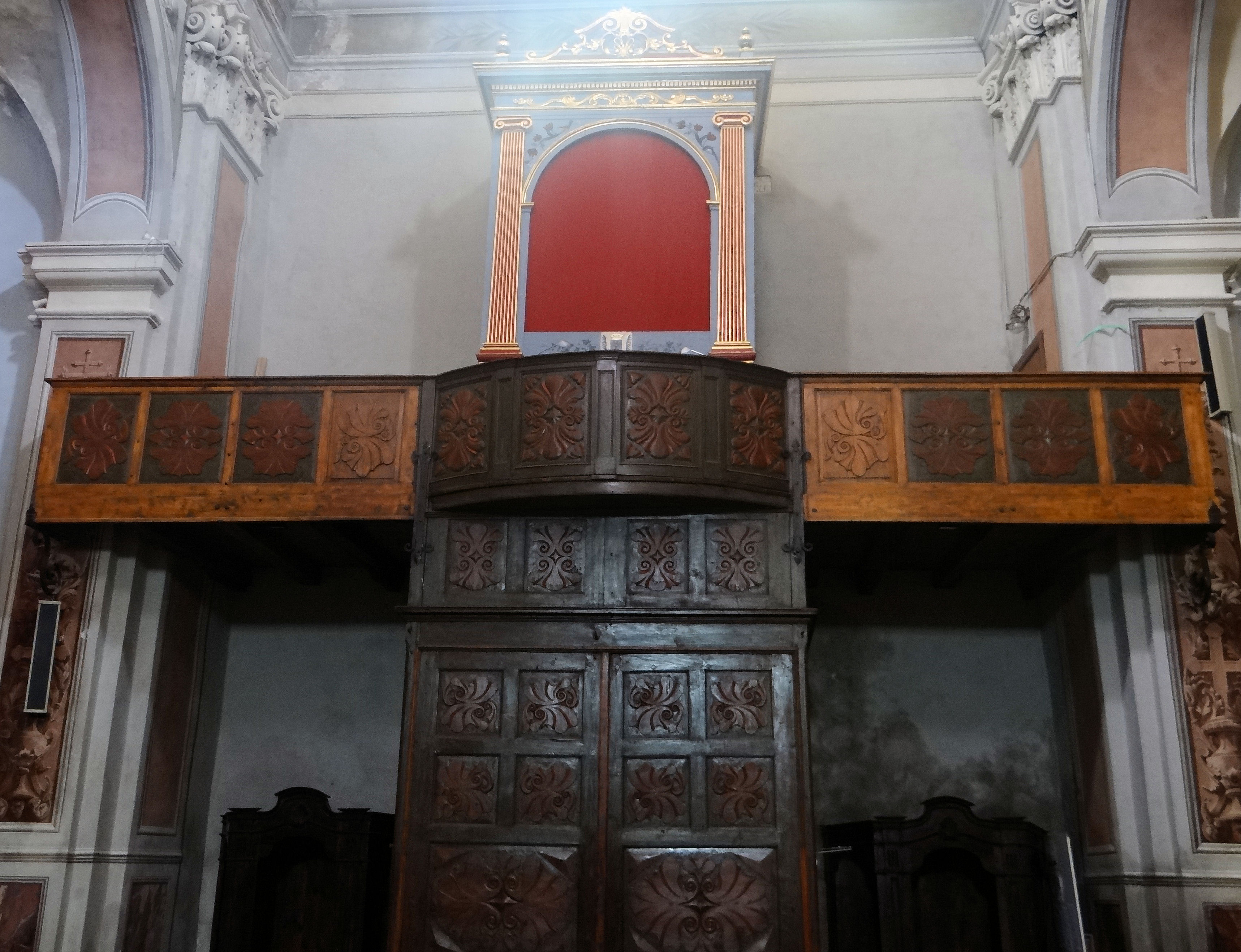 Contes - Église Sainte-Marie-Madeleine - L'orgue de Frederico Valoncini sur la tribune